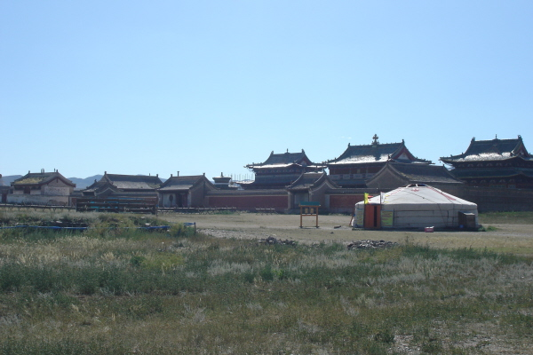 Vue du monastère de l'Erdene Zuu - Karakorum (Mongolie)